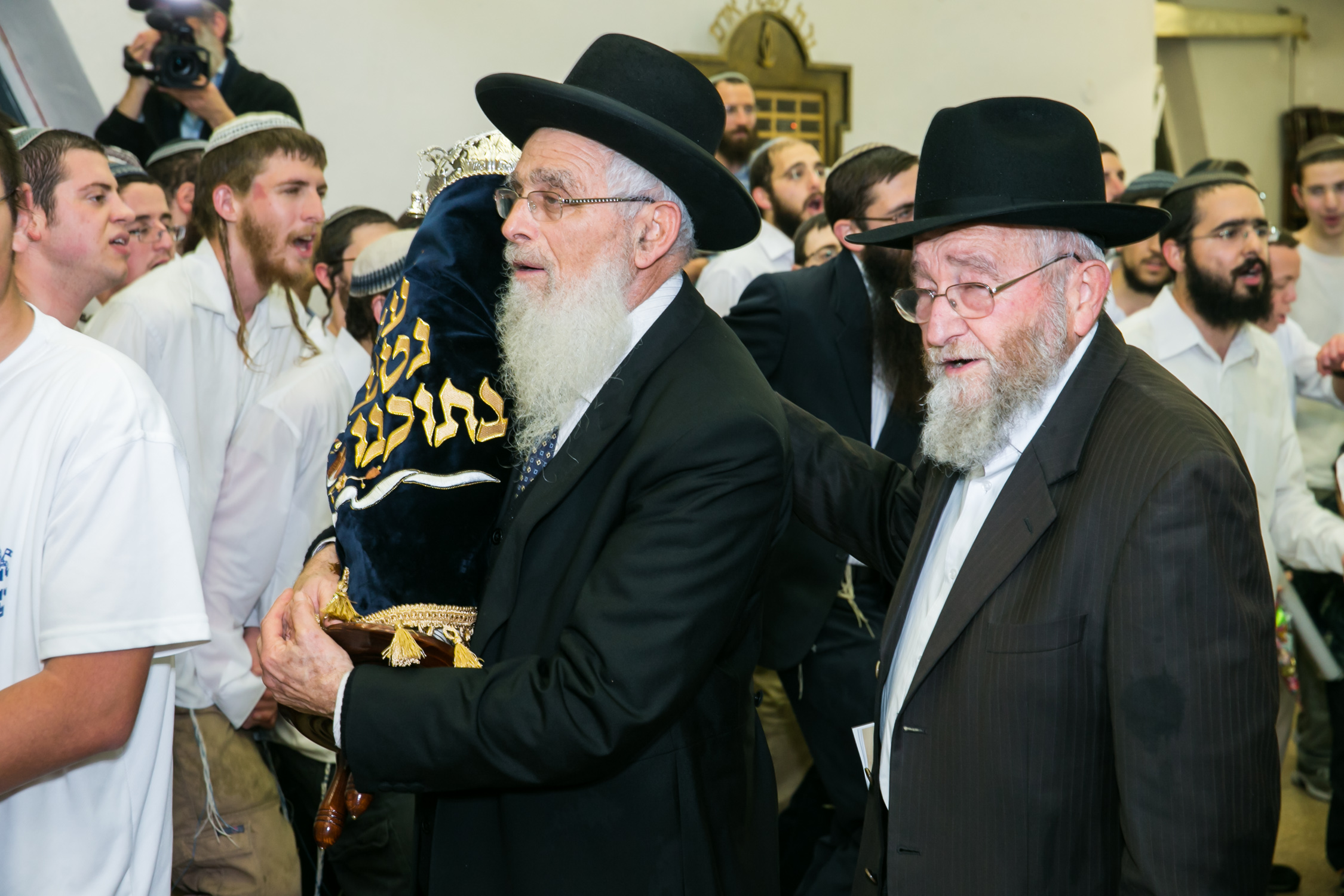 ישיבת מרכז הרב.